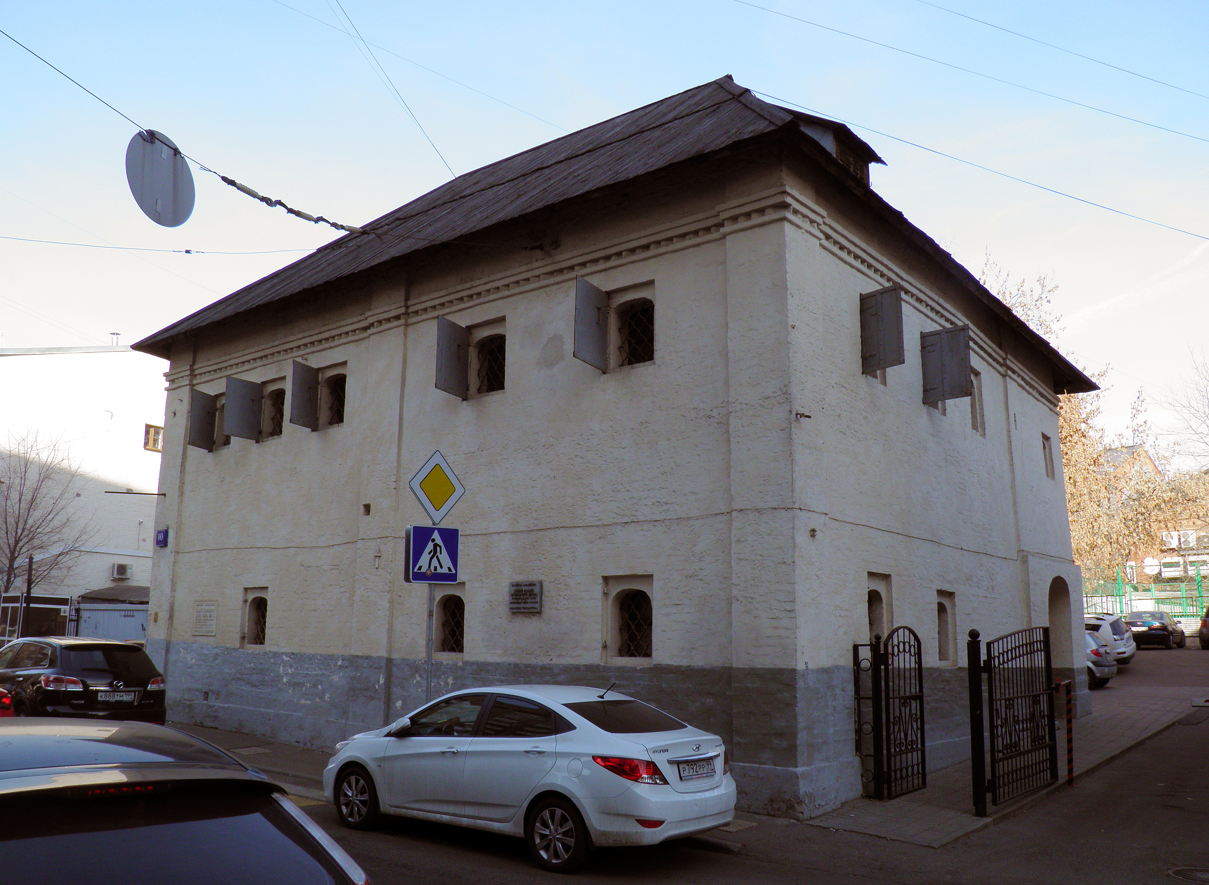 Палаты Хамовного двора (Москва и Московская область, Москва, Льва Толстого улица, 10)